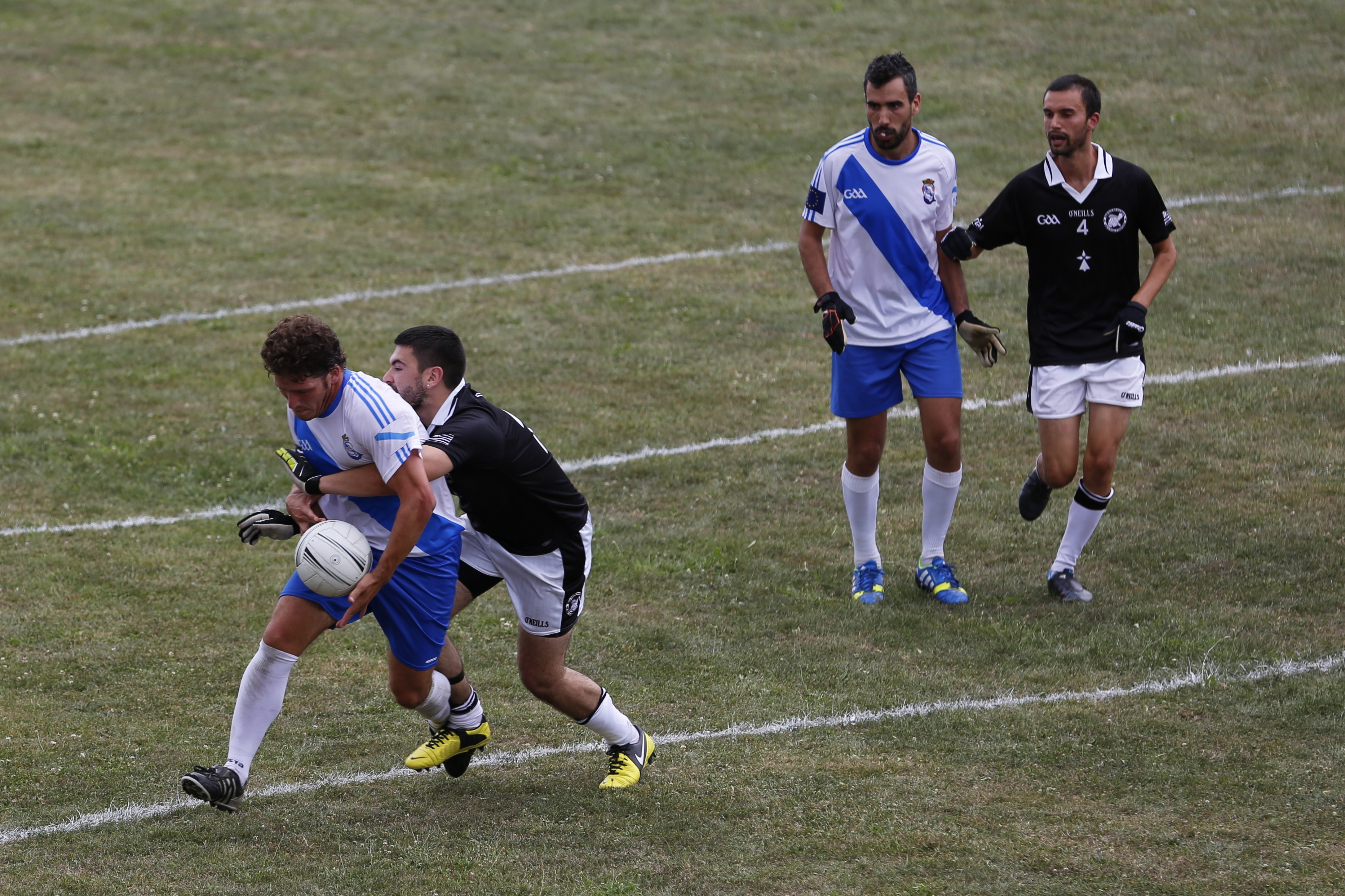 Match de football gaélique entre la Bretagne et la Galice lors du Festival interceltique de Lorient 2013.